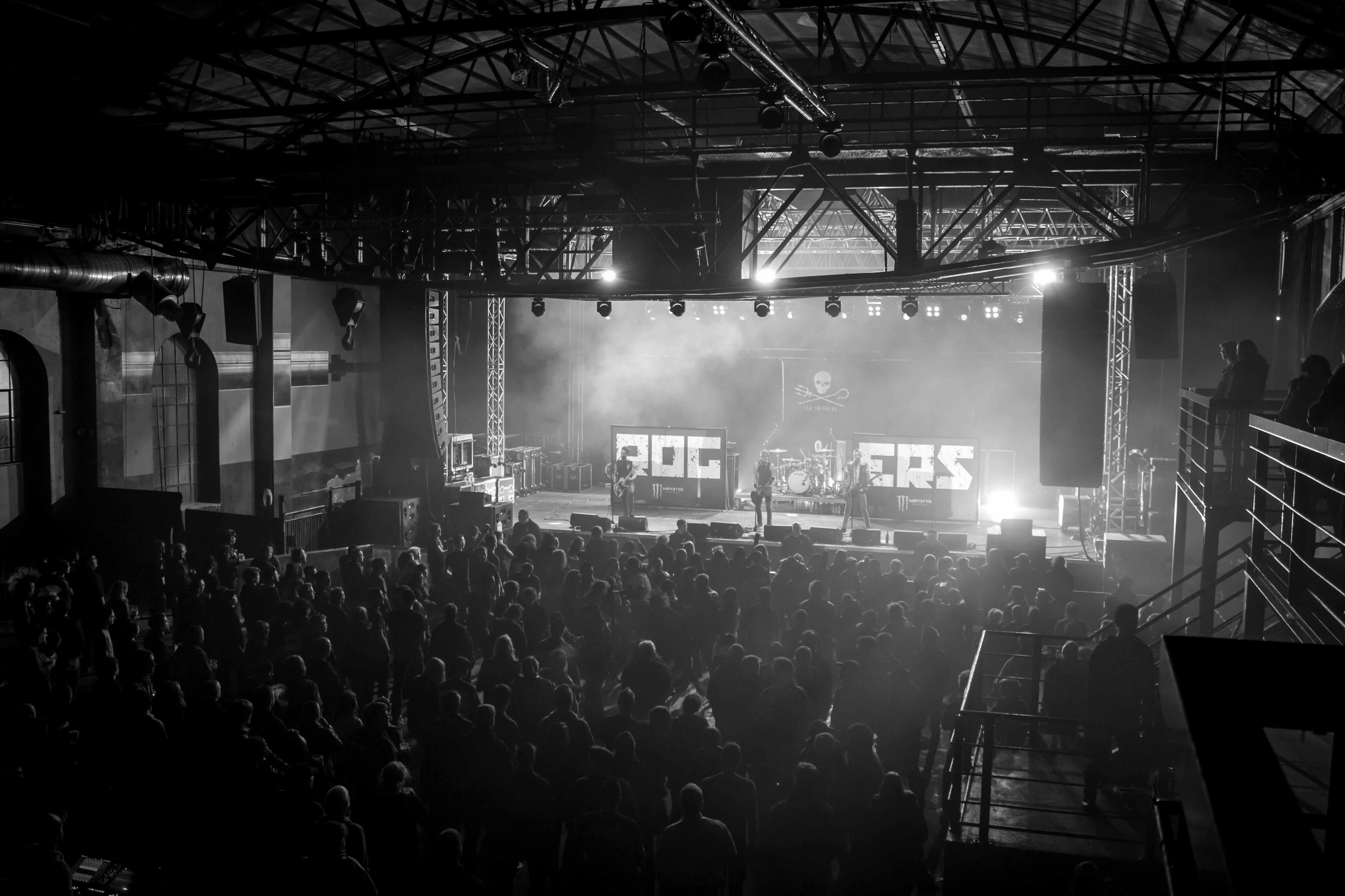 Rogers bei Punk Im Pott 2013 (c) Daniel Osterkamp